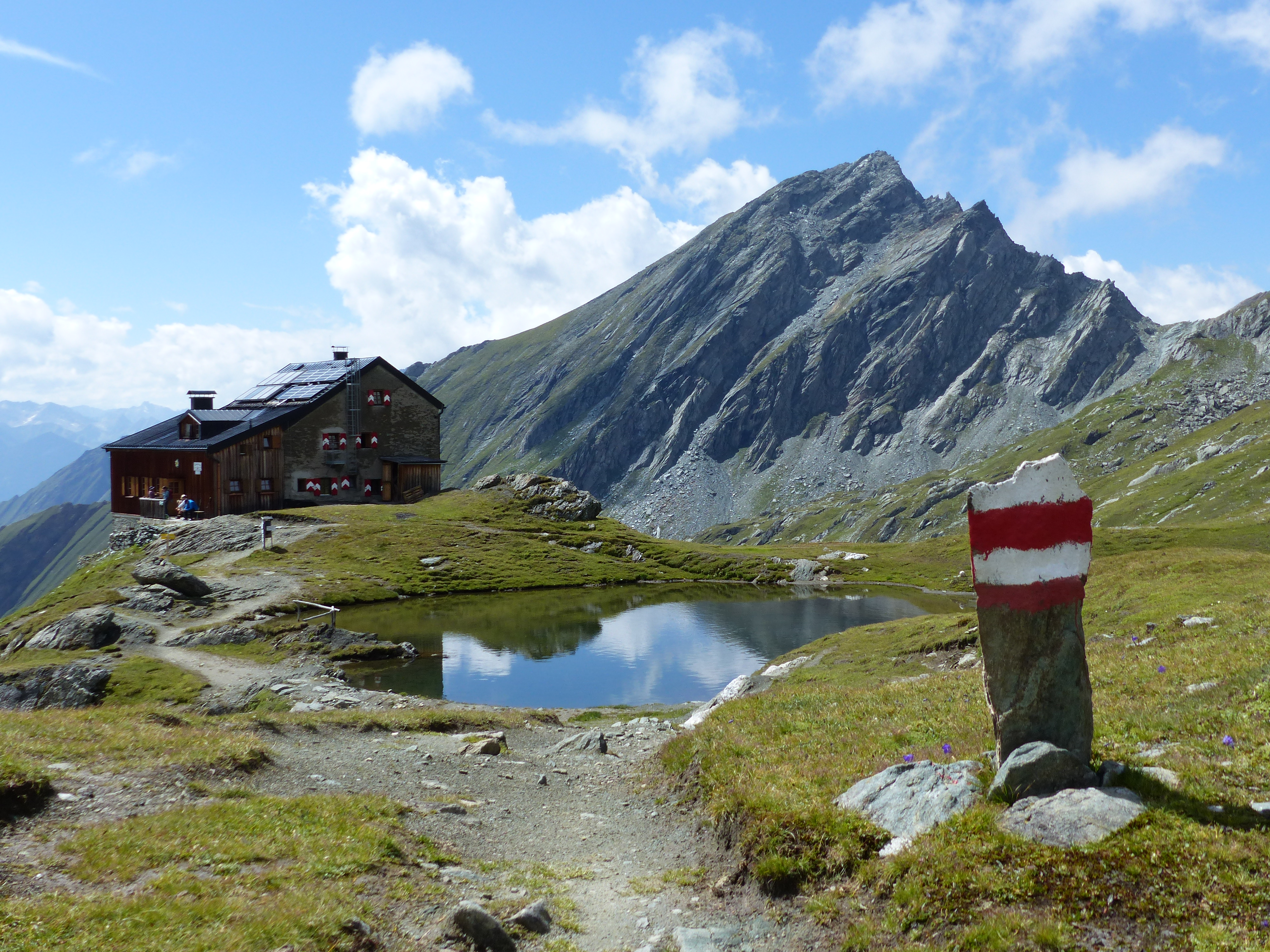 Sudetendeutsche Hütte mit Nussingkogel